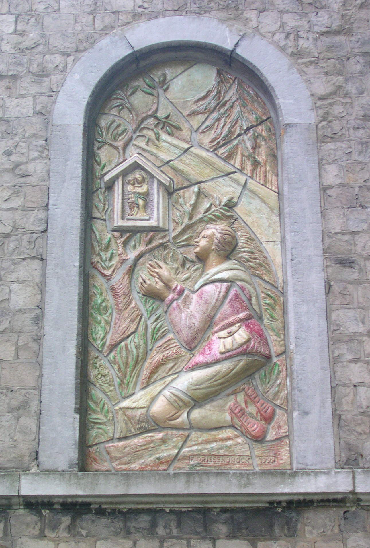 Moresnet, Relief von F. Griesenbrock an der Marien-Wallfahrtskirche der Franziskaner, datiert 1999